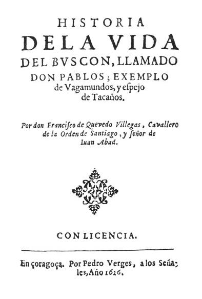 Original title page of Francisco de Quevedo's El Buscón.